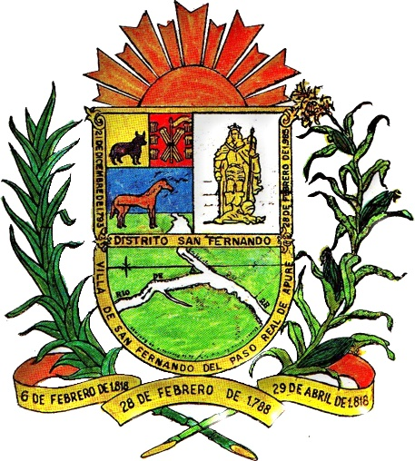 ESCUDO